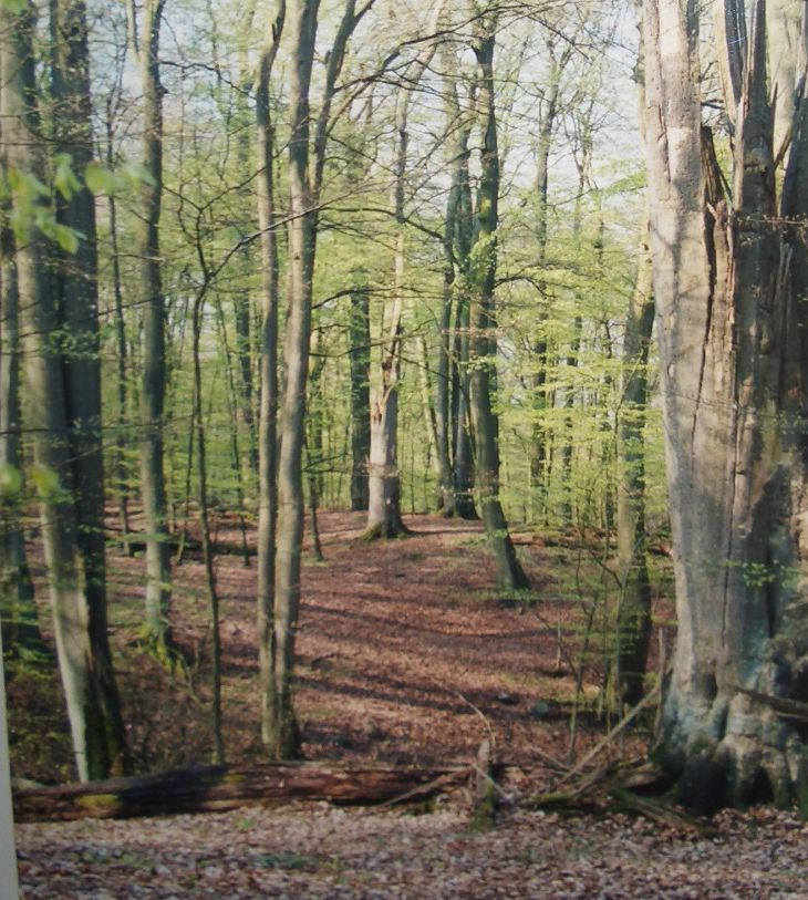 Eindruck aus dem Naturschutzgebiet Großes Holz in Mecklenburg-Vorpommern bei Linstow.